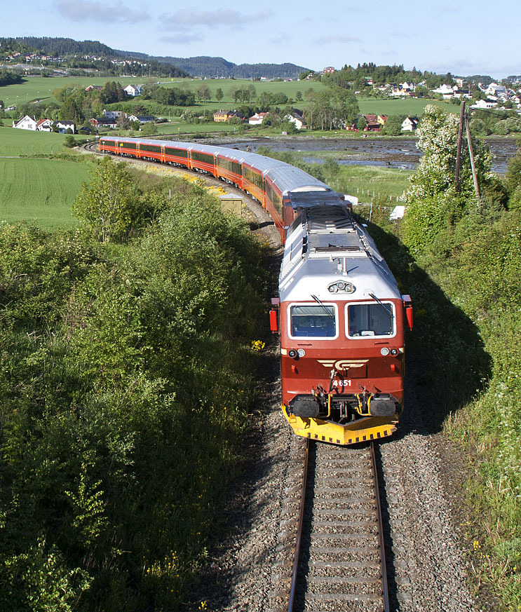 Norsk jernbanetog 2012 bestående av lokomotiv og vogner. Dagtoget til Bodø ved Være ved Trondheim.